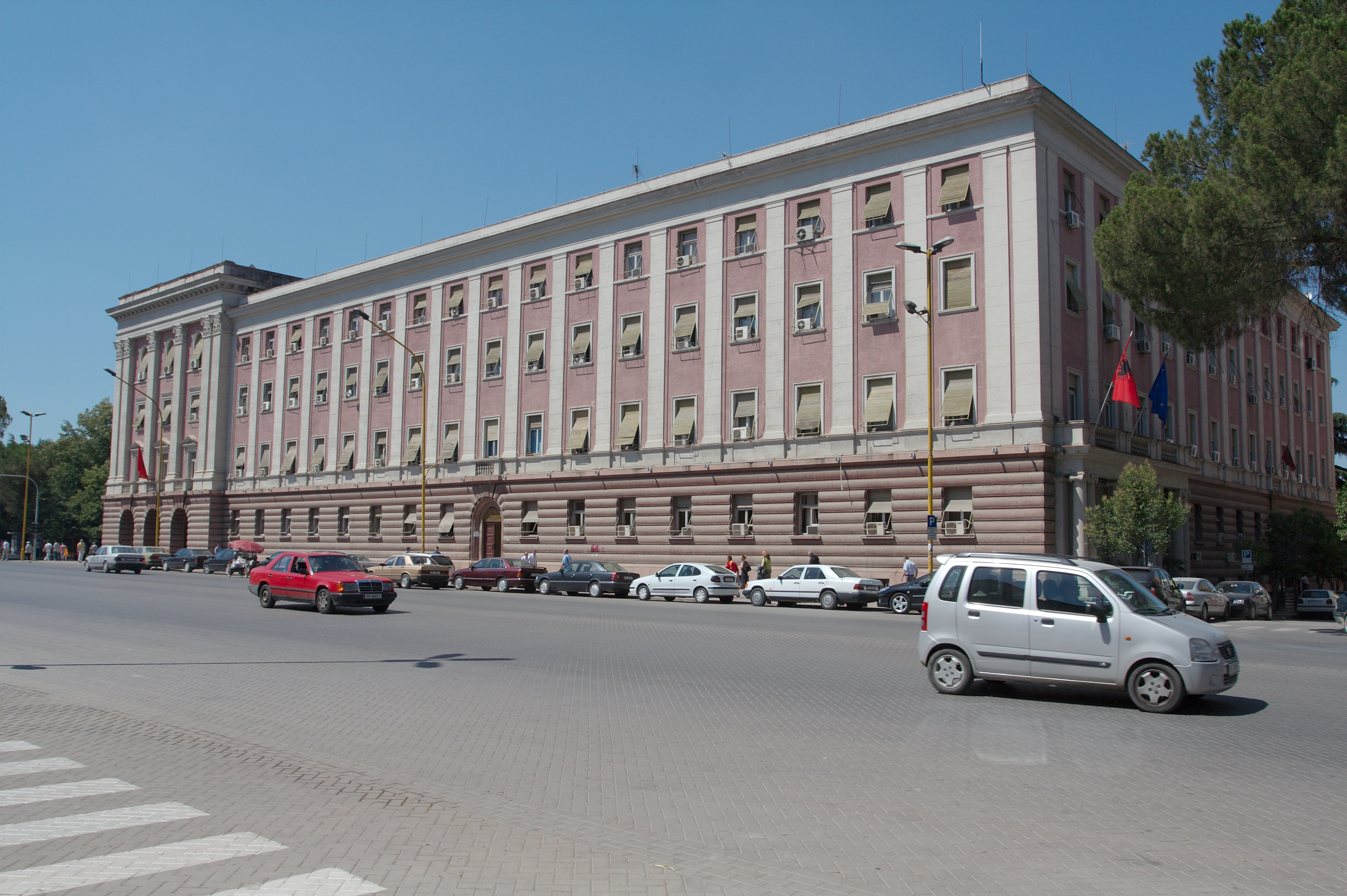 Taken in Albania